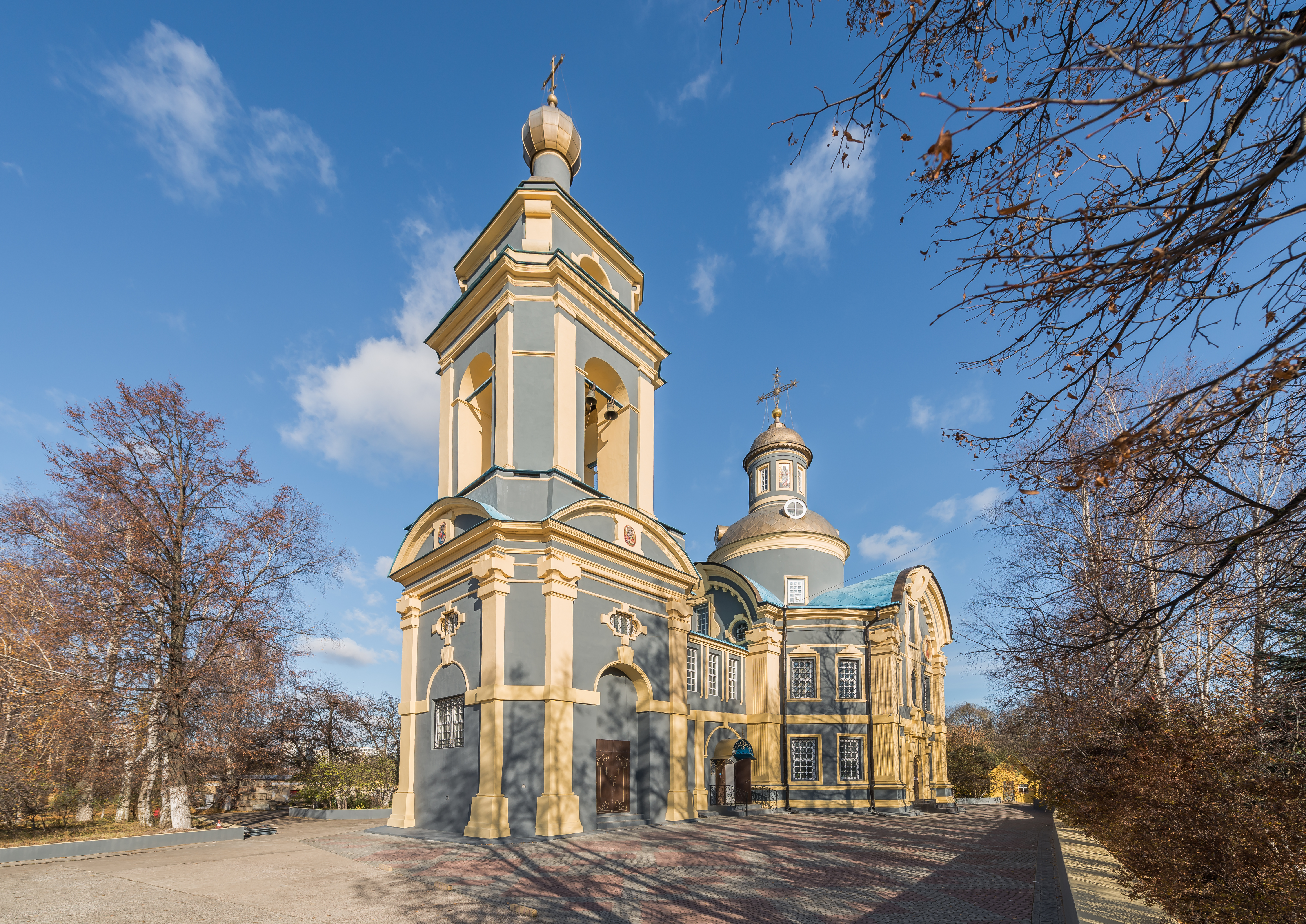 Церковь Николая Чудотворца в Троекурове: Рябиновая ул., дом 24А, Очаково-Матвеевское, Западный округ, Москва